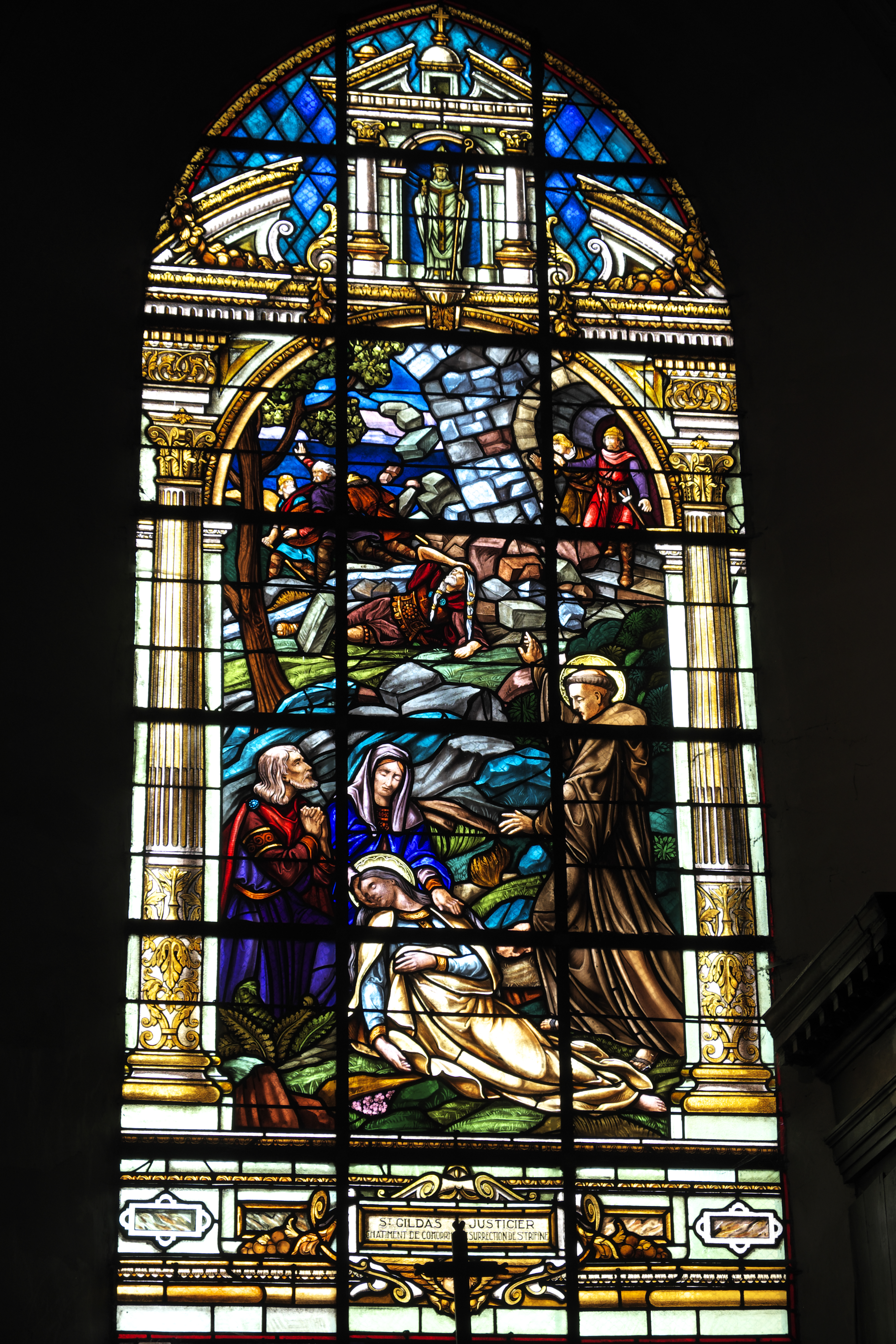 Katholische Pfarrkirche Saint-Gildas in Auray im Département Morbihan (Region Bretagne/Frankreich), Bleiglasfenster aus dem frühen 20. Jahrhundert; Szenen aus dem Leben des heiligen Gildas